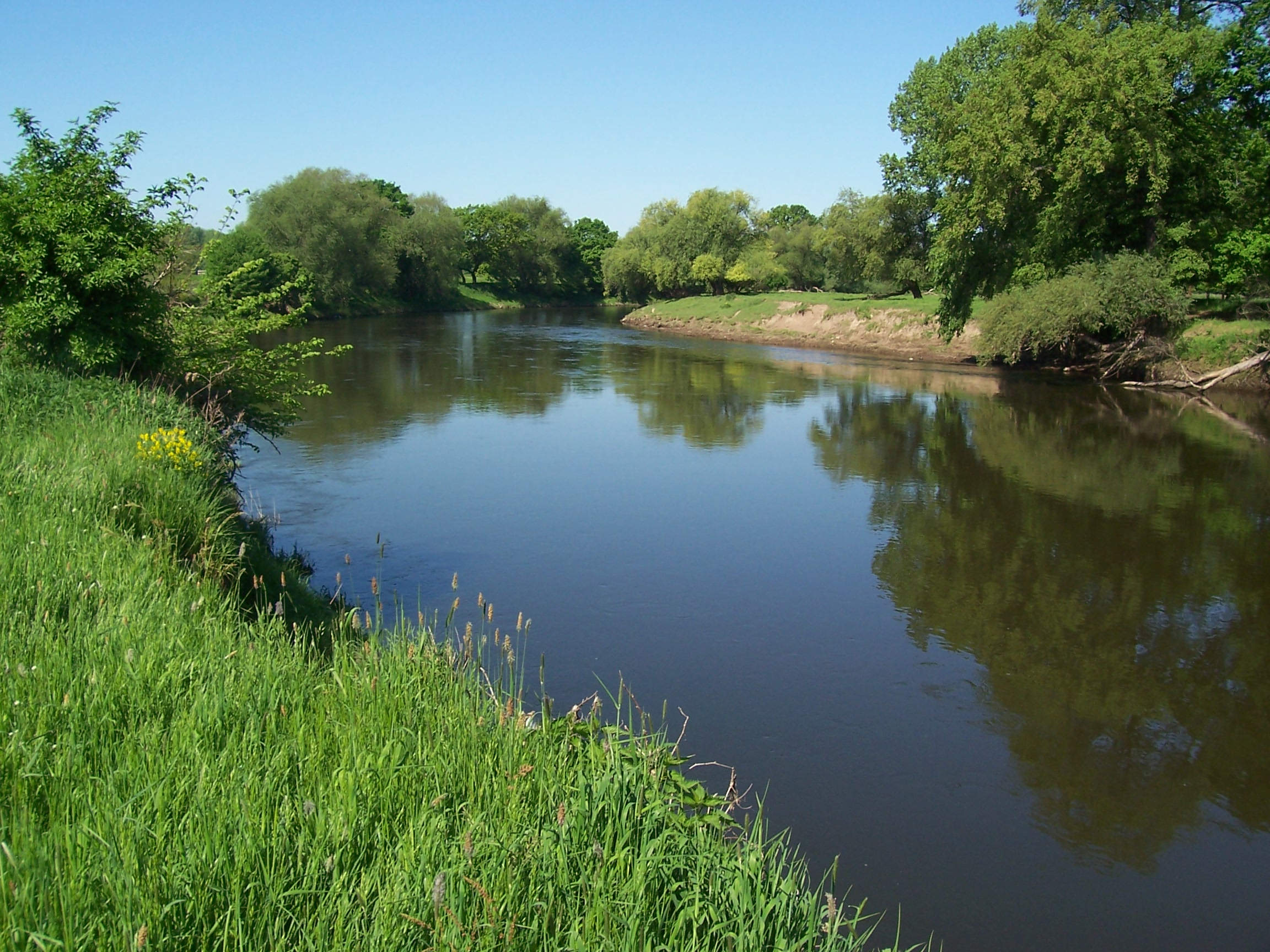 Mulde bei Hainichen